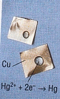 Die Amalgamprobe - ein Quecksilbernachweis